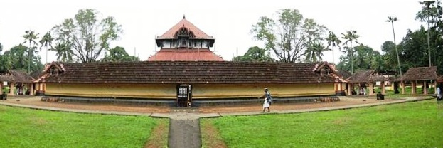 kaduthuruthi siva temple